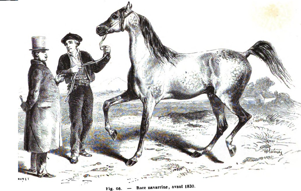 Dessin du cheval Navarrin avant 1830, tiré d'une encyclopédie zootechnique de 1861